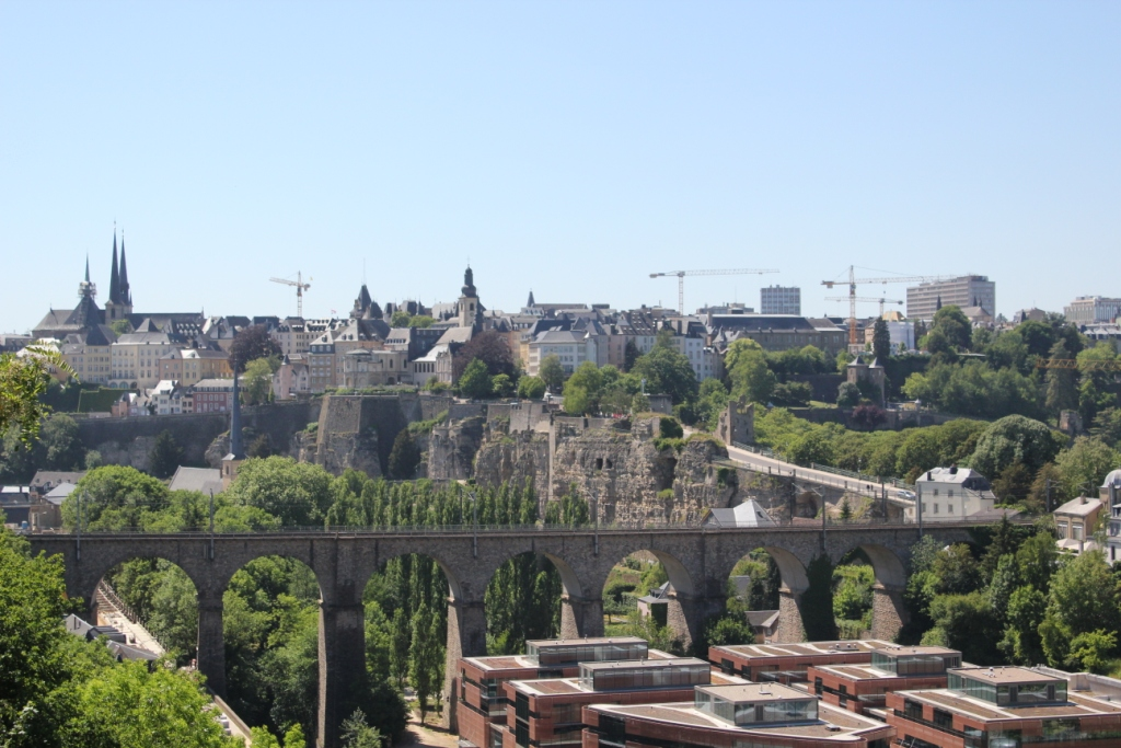 De Clausener Viaduc vun der Centser Säit aus gesinn.